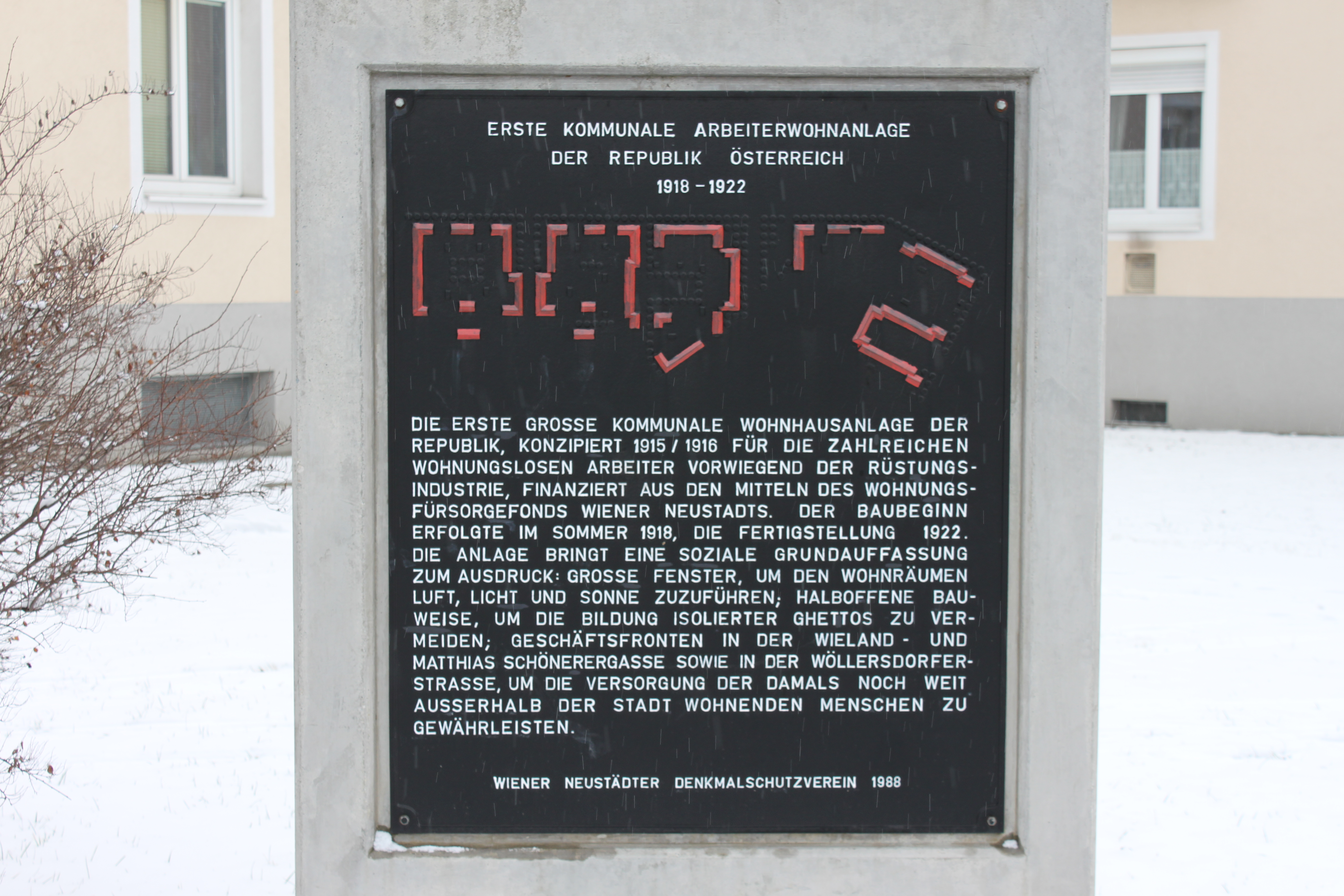 Dr.-Karl-Renner-Hof in Wiener Neustadt, Reliefartige Darstellung der Wohnhausanlage mit Beschreibung an der Ecke Fliegergasse / Wöllersdorfer Straße